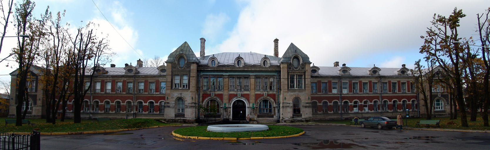 Kreenholmi uus haigla